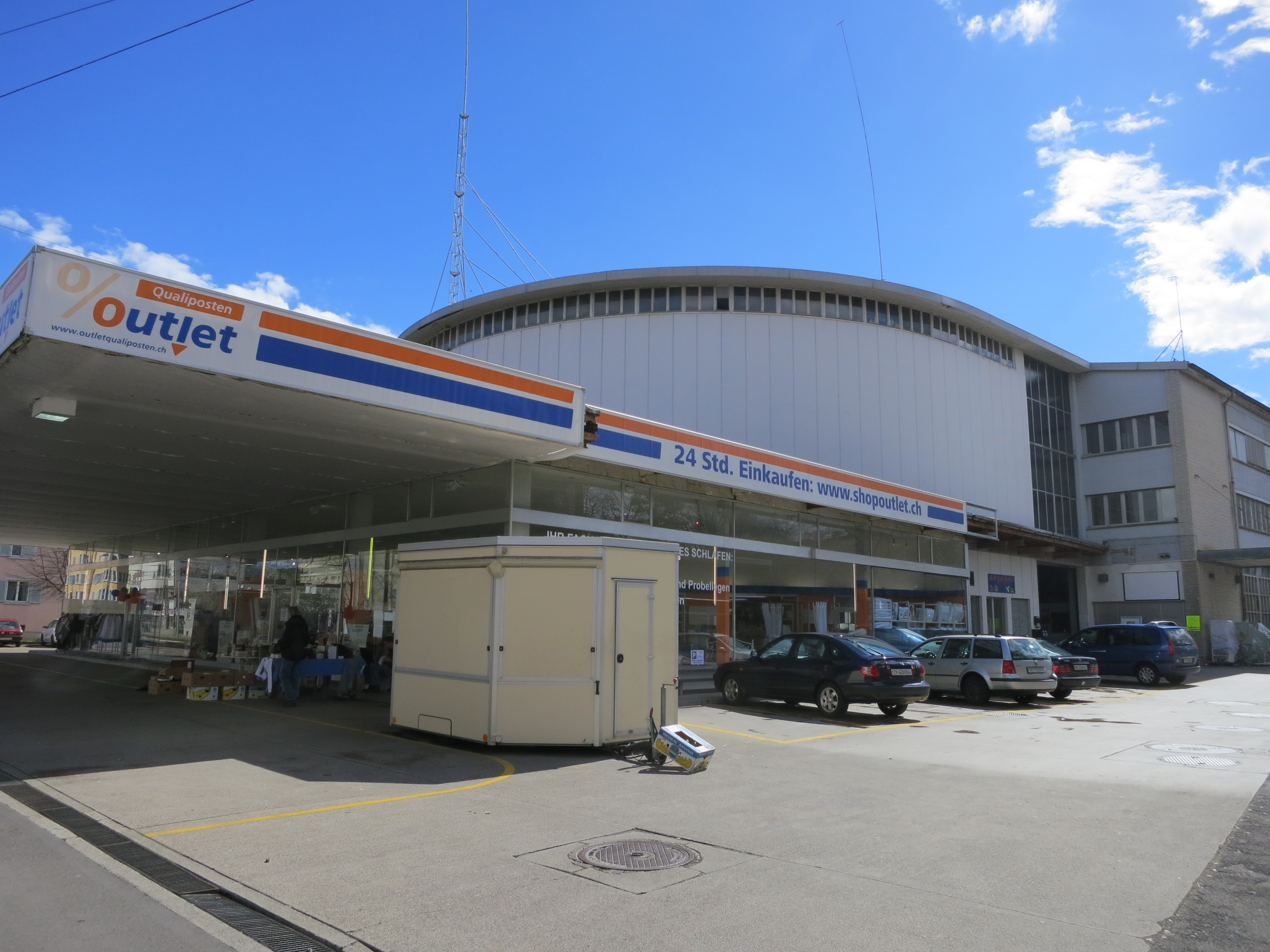 ehemalige Citroen-Garage Schlotterbeck, Zürich-Wiedikon, Schweiz